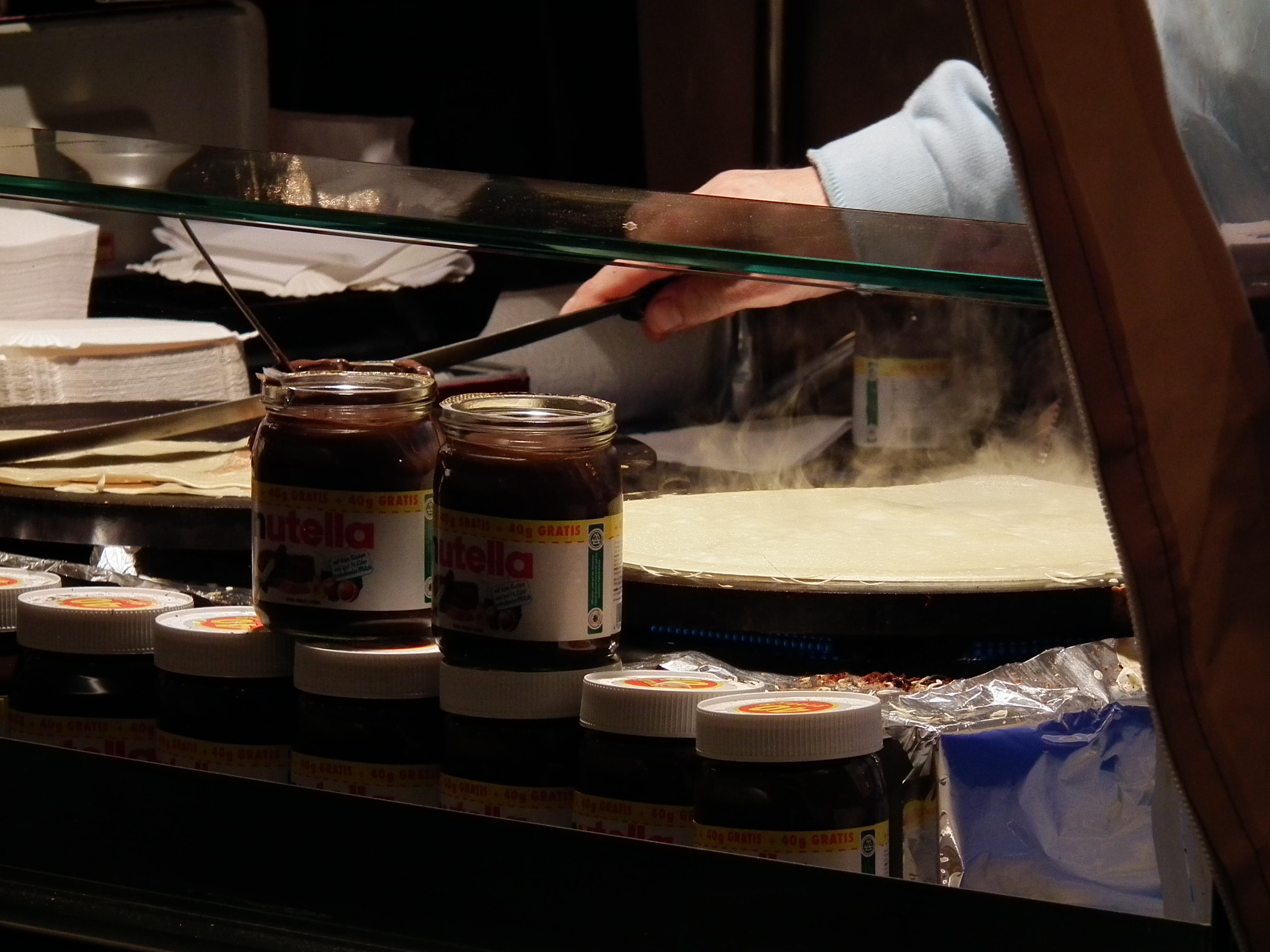 Herstellung von Crêpes